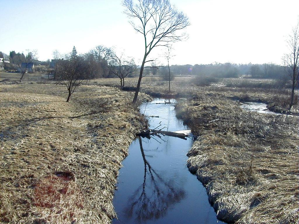 Liepupe